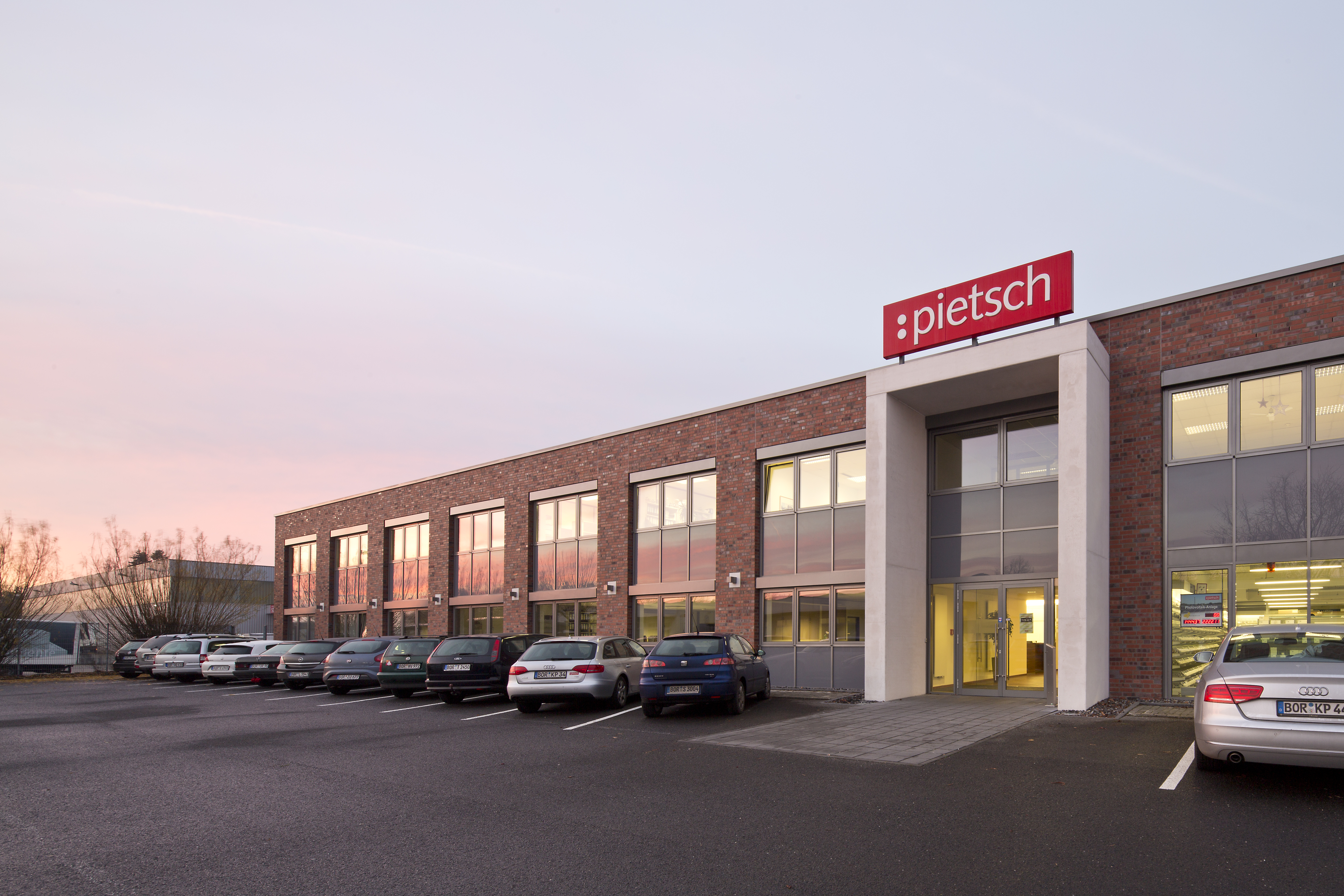 Firmenzentrale der Unternehmensgruppe Pietsch